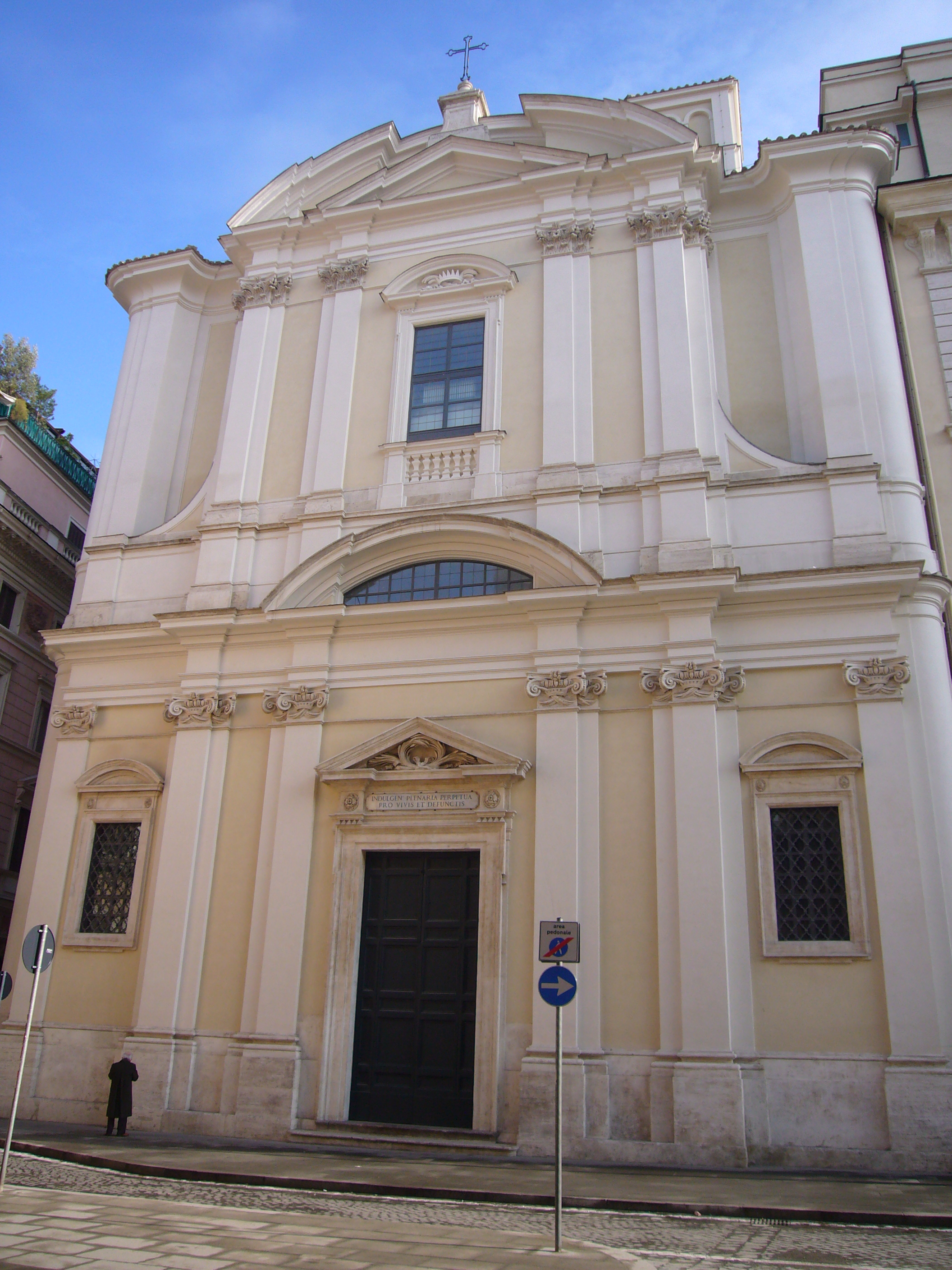 Roma, Basilica di Sant'Apollinare alle terme neroniano-alessandrine (piazza Navona) dopo il restauro (2007)